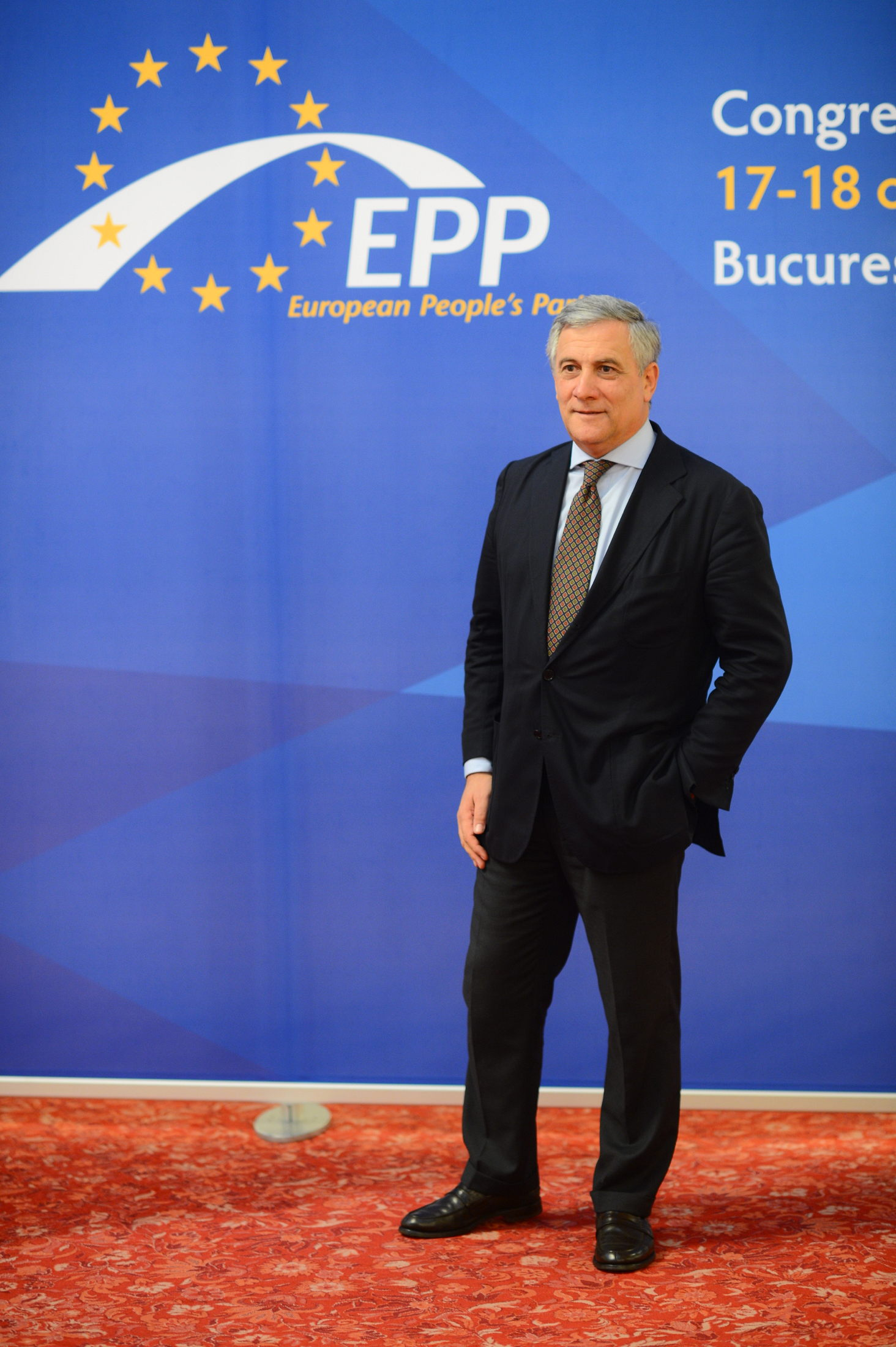 Tajani al Congresso del PPE nel 2012